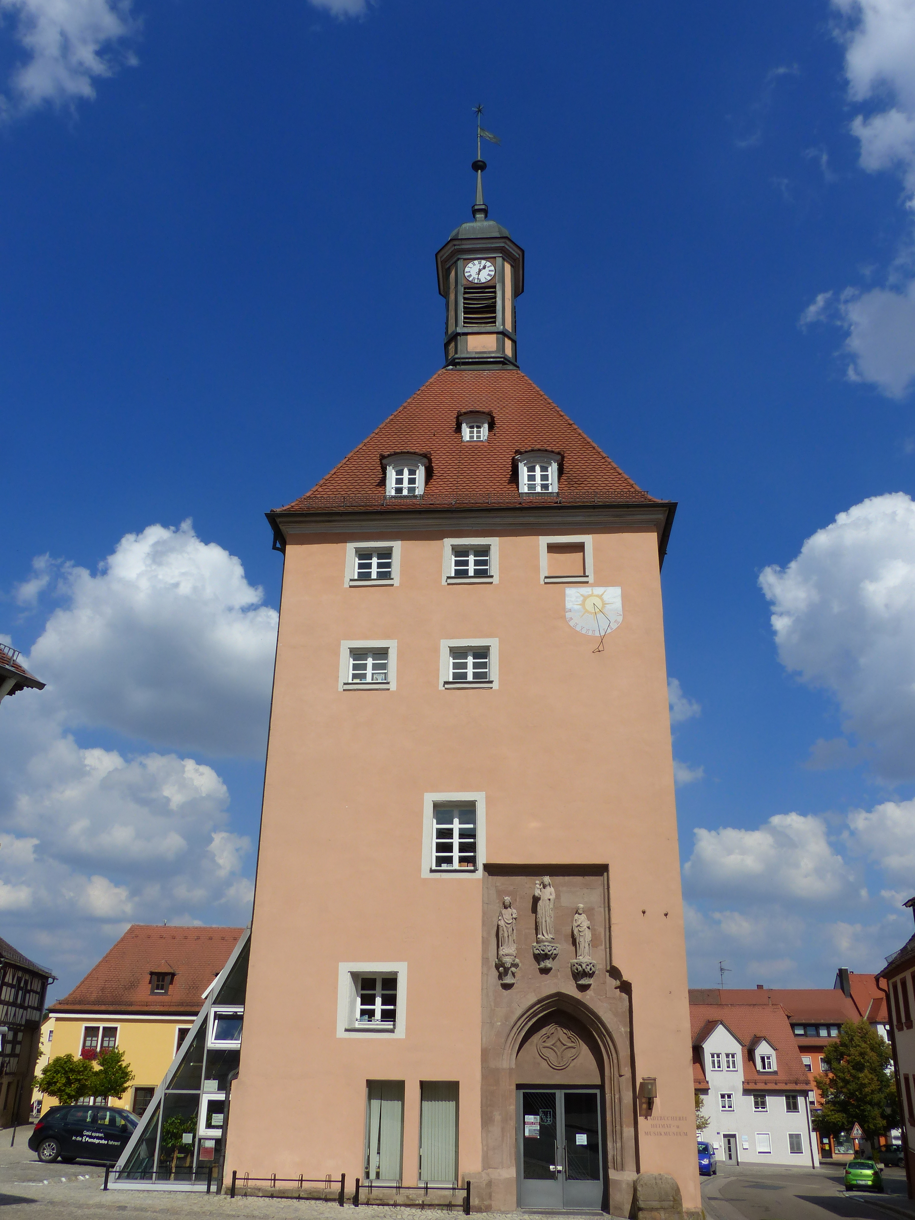 Katharinenturm, Hauptstraße 20, HeilsbronnThis is a photograph of an architectural monument.